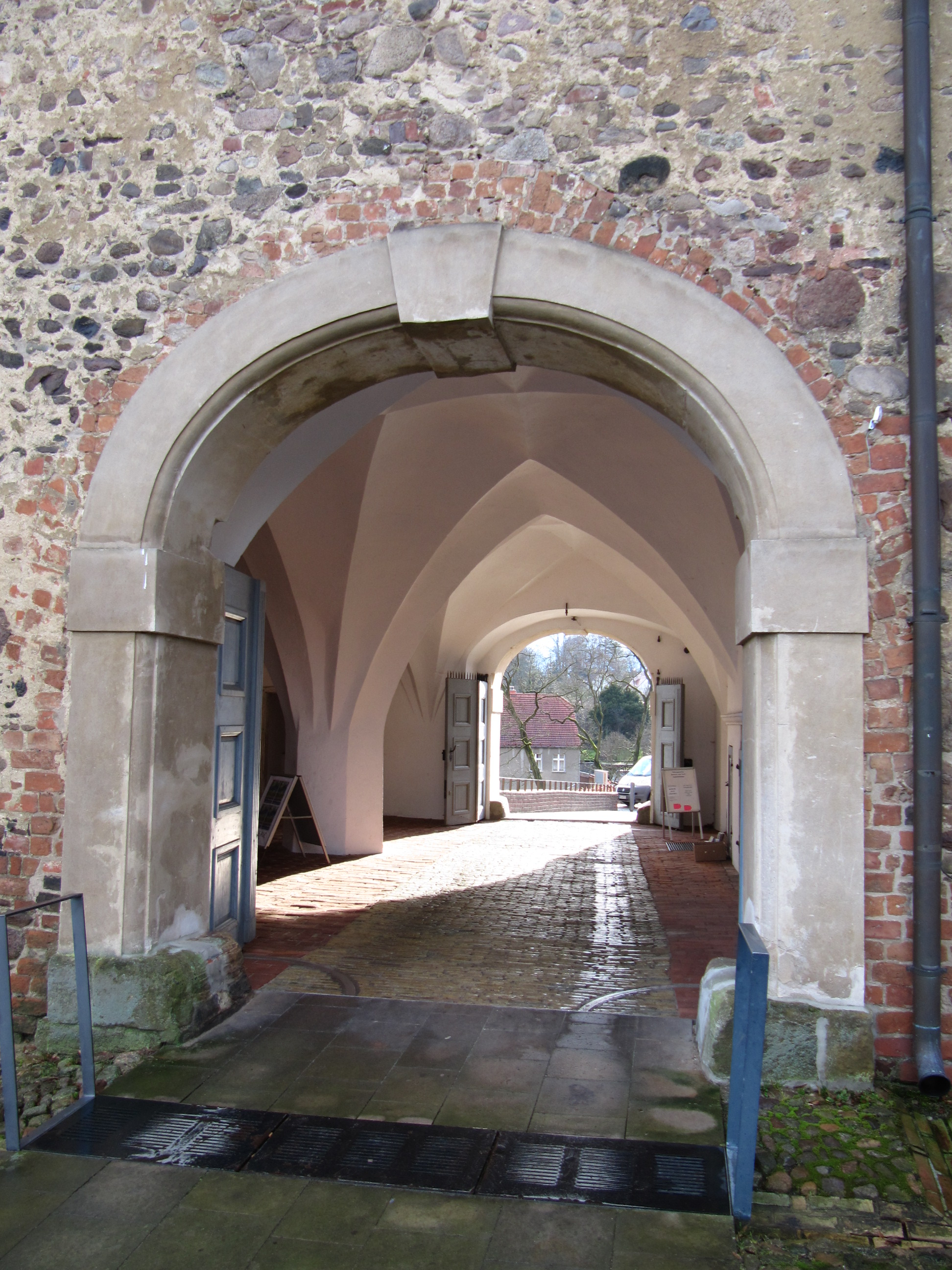 tor burg eisenhardt innen